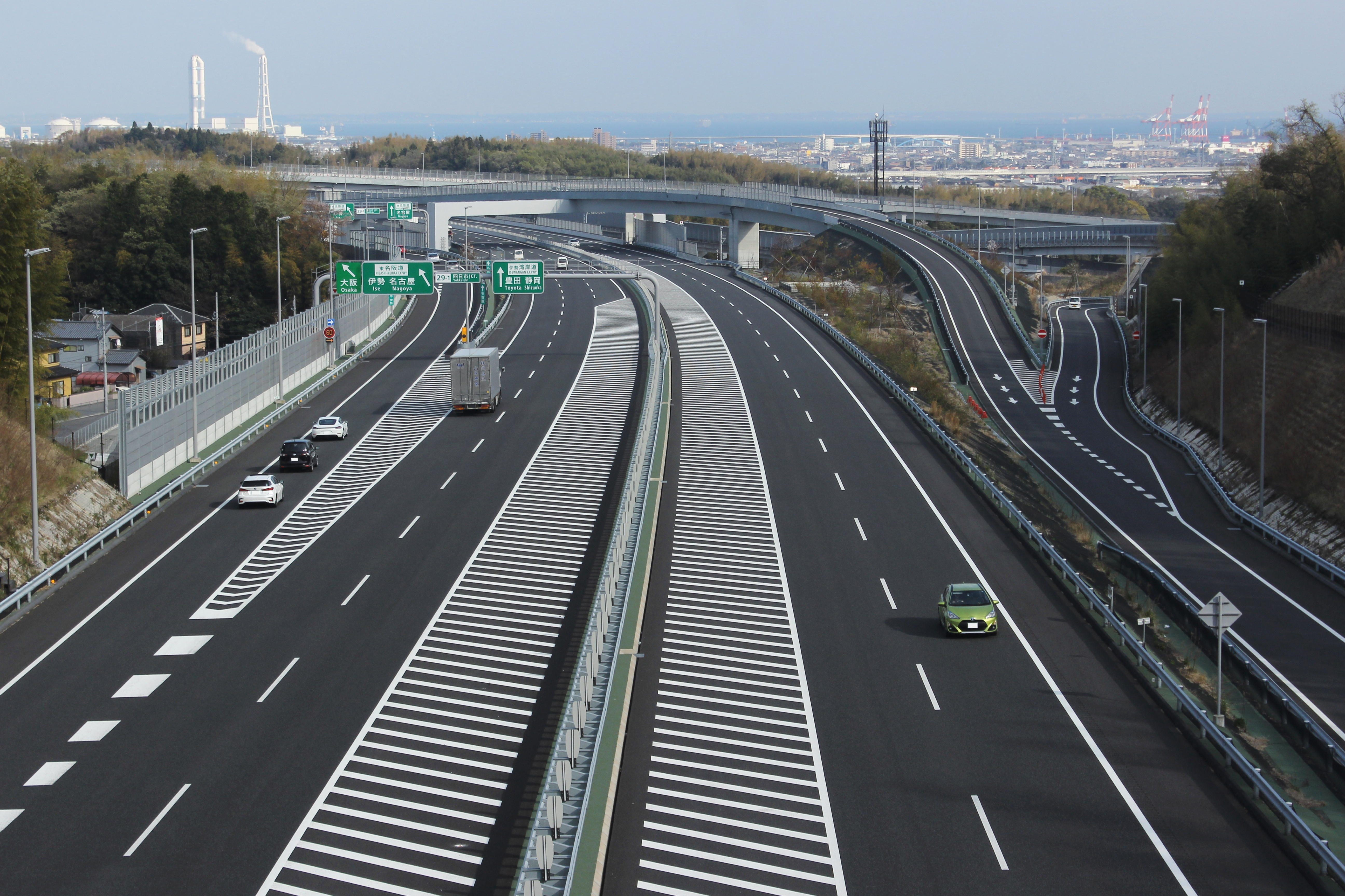 E1A新名神高速道路方面から見る四日市ジャンクション